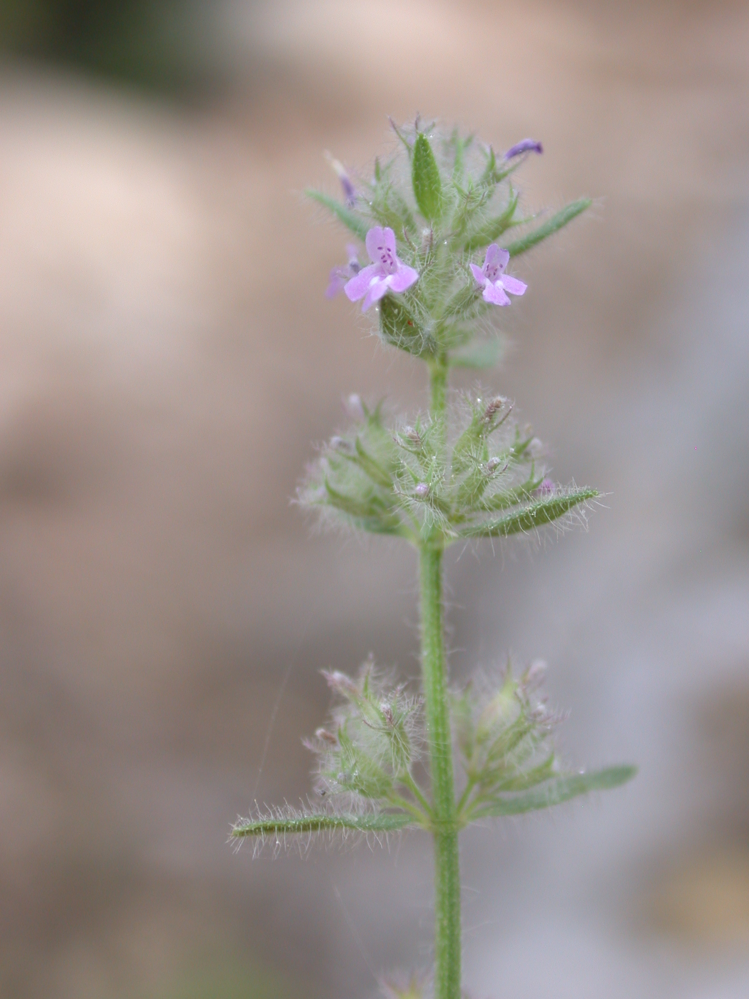 Micromeria nervosa Desf. (זוטה מעורקת), Mount Carmel, Israel, April 2008.